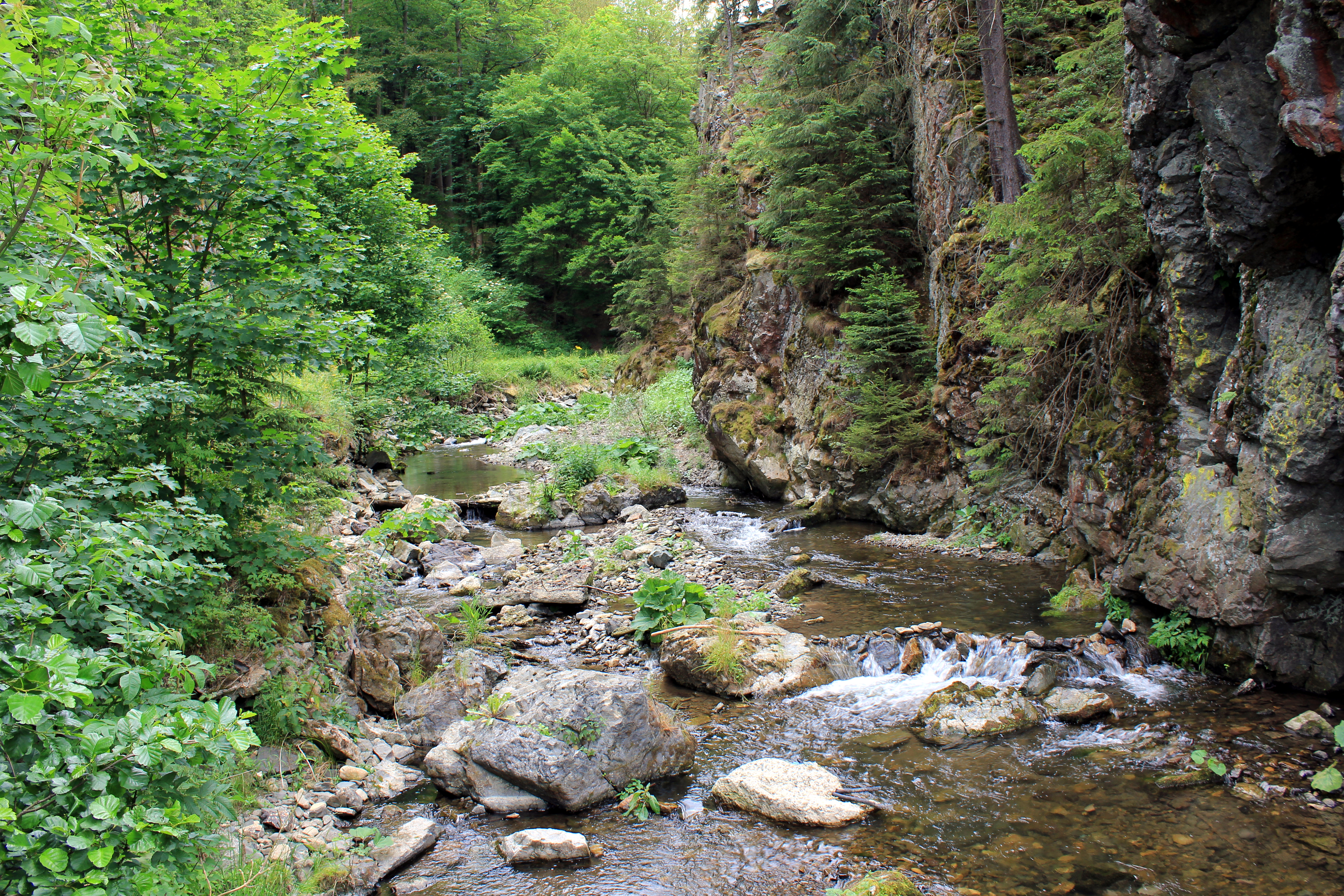 Blick in die Steinachklamm